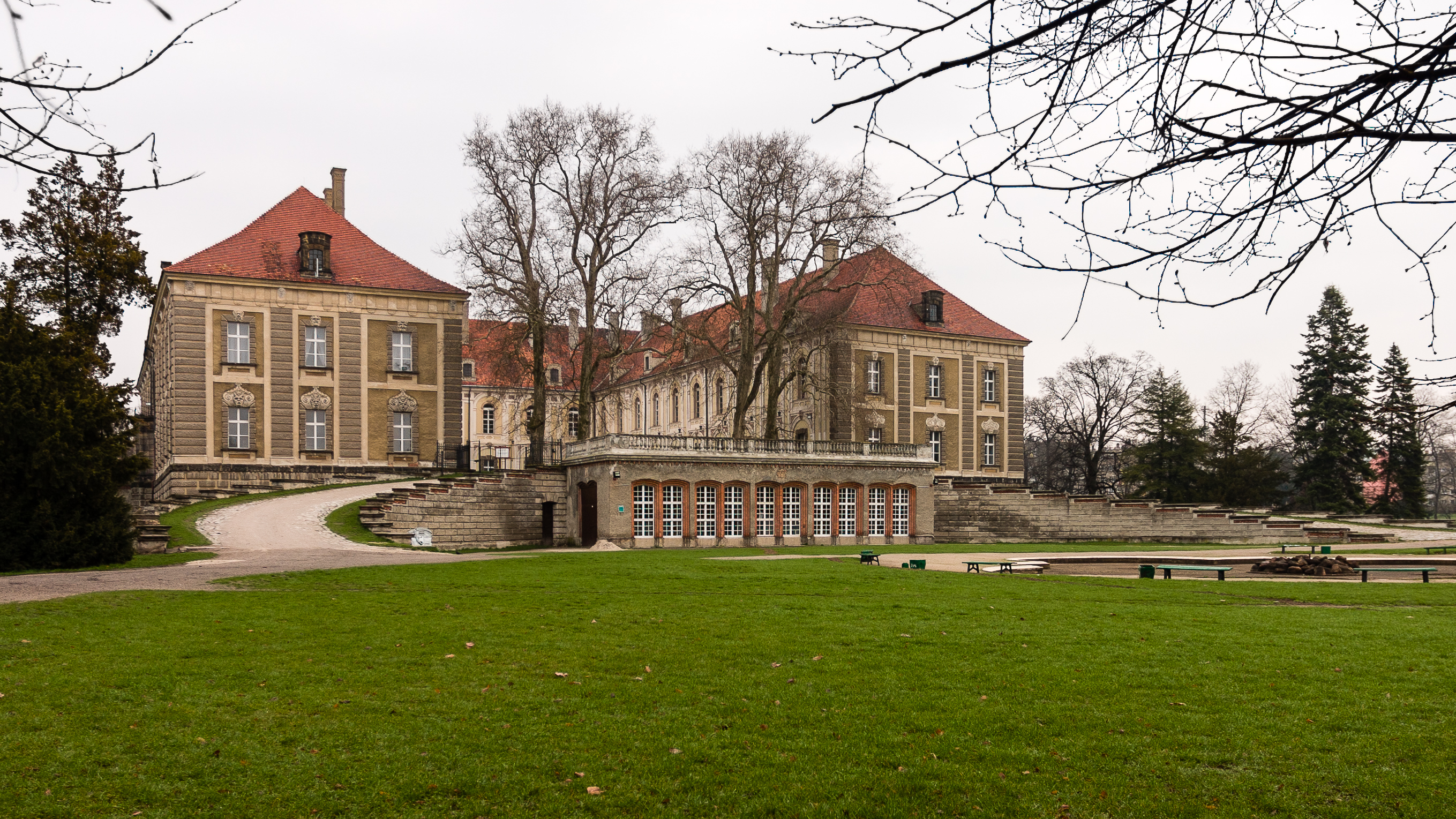 Żagań, ul. Szprotawska 4 - zespół zamkowy: zamek (pałac) 1631-33 1670-86 XVIII XIX (zabytek nr L-116-1-3-A)